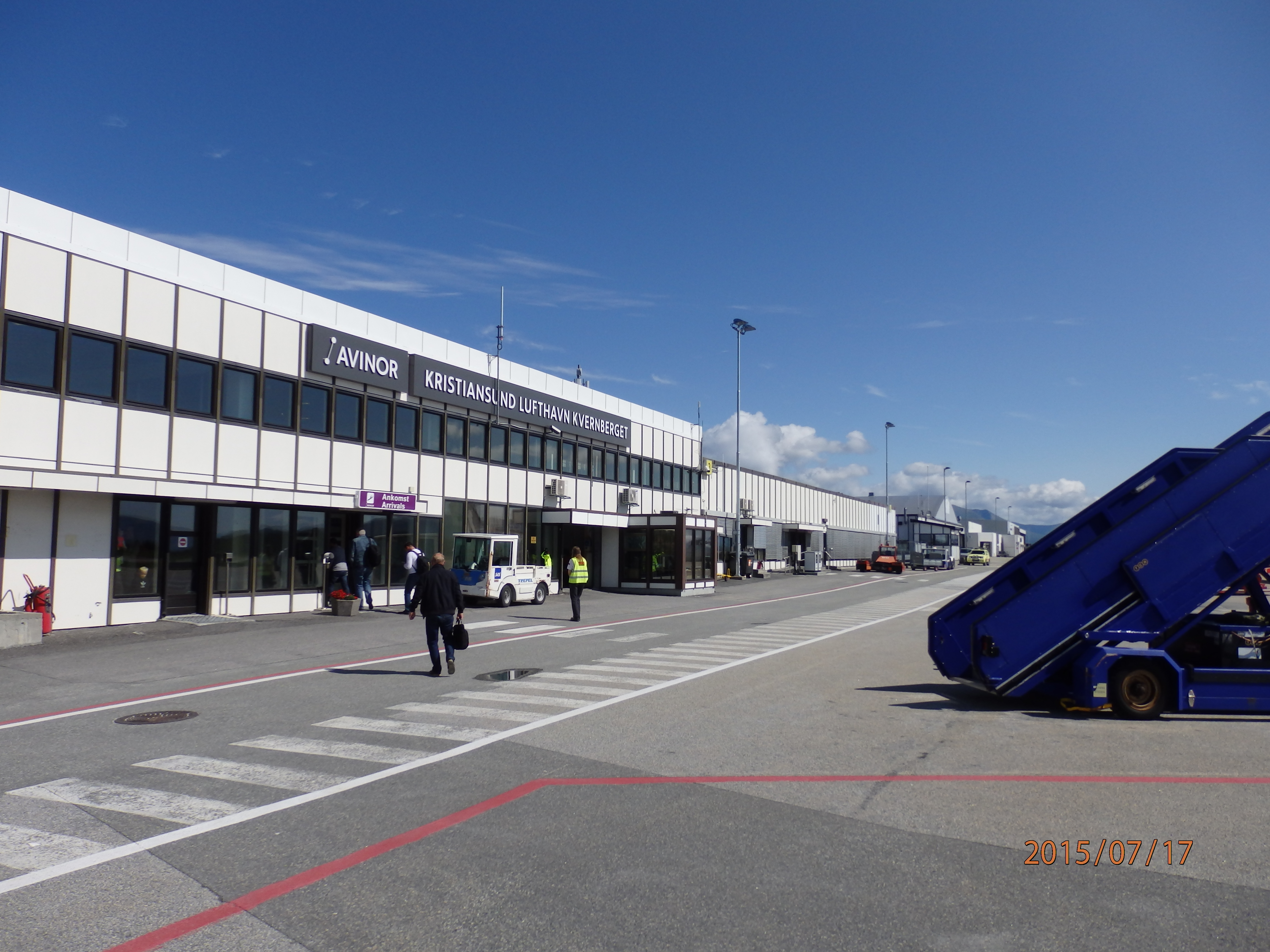 Kristiansund lufthavn Kvernberget